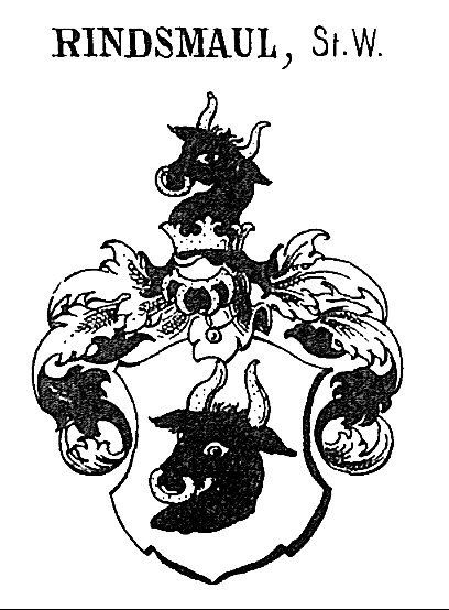 Stammwappen derer Rindsmaul, fränkischer Uradel, auch steirischer und mährischer Adel.